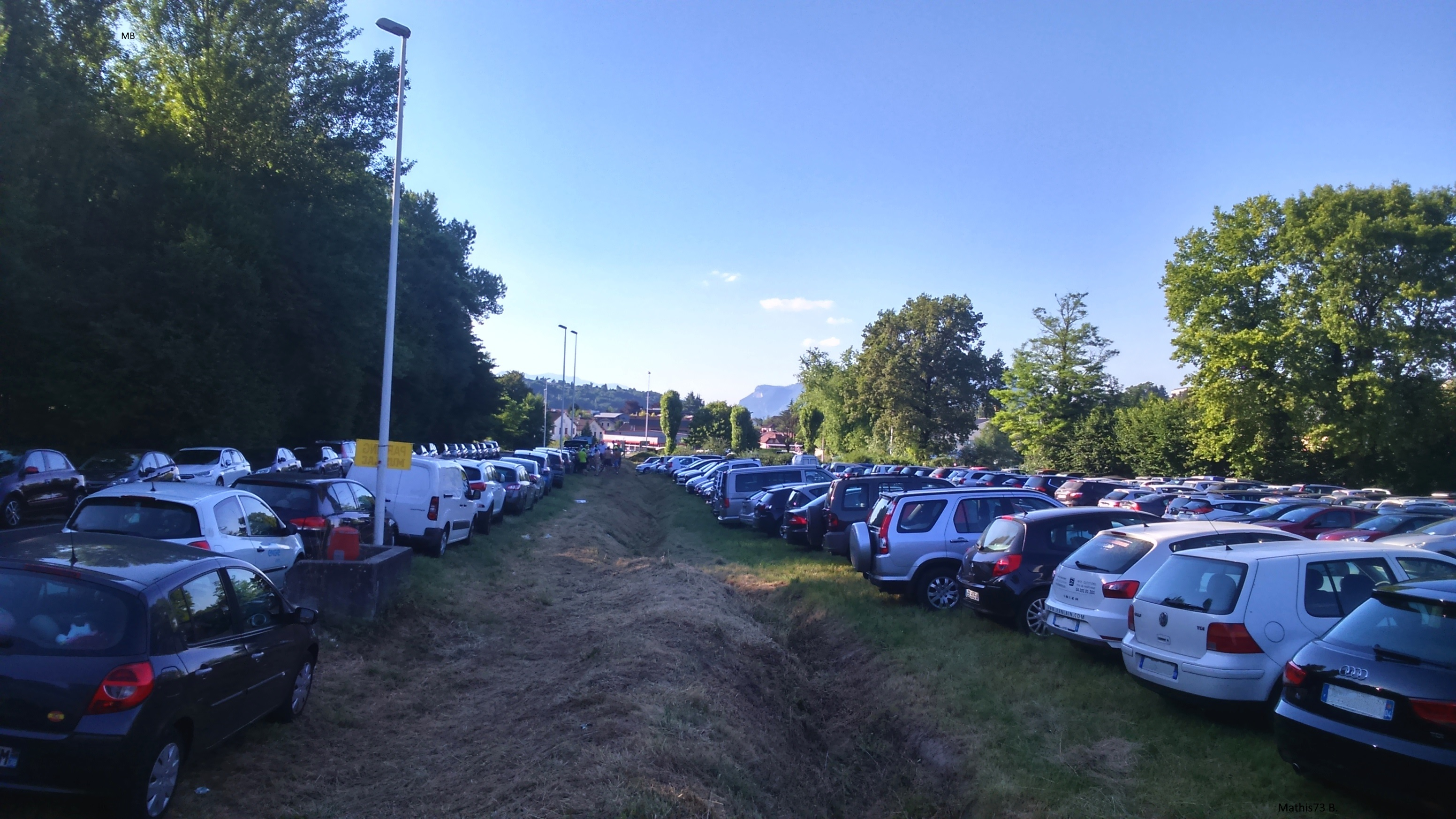 Stationnement des véhicules à l'entrée sud de l'agglomération pour le festival Musilac 2016.